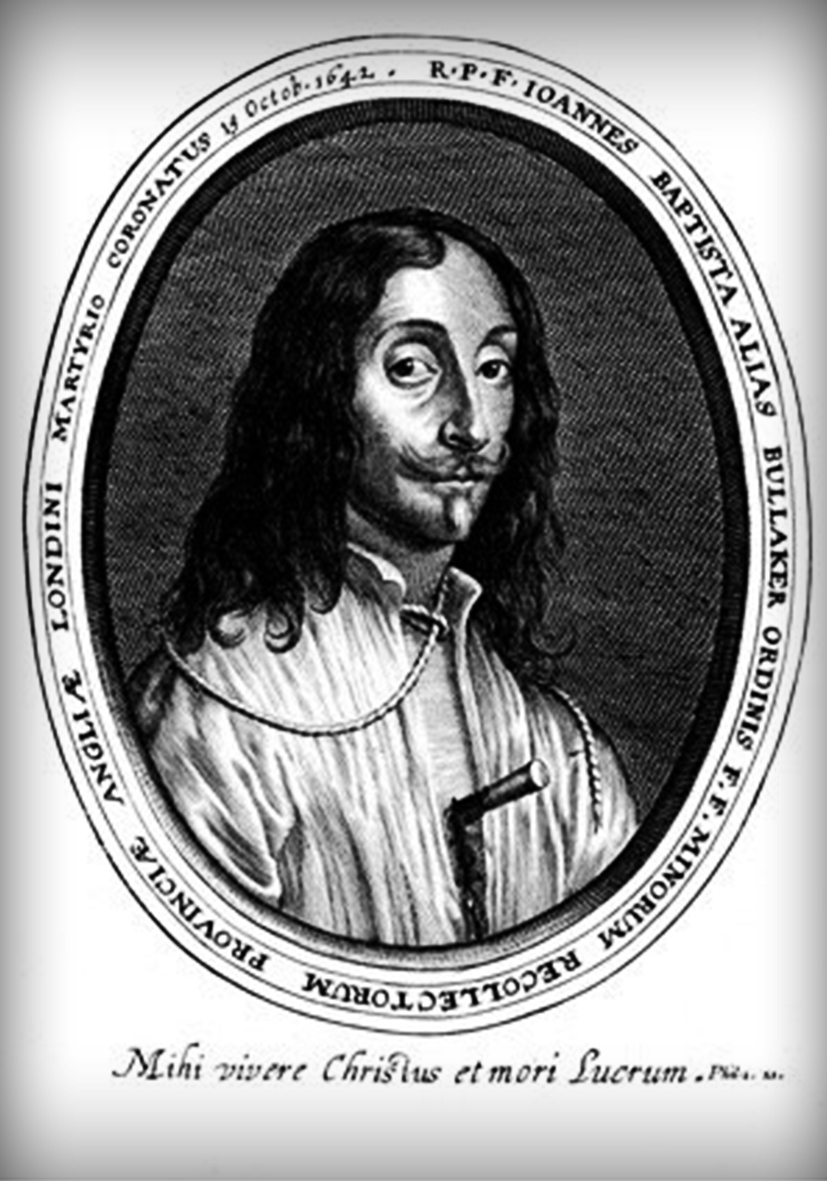 Бл Фома Баллокер OFM, друг Артура Белла, который опередил его в мученичестве